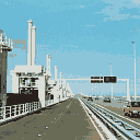 voorbeeld gif dithering, eigen foto, eigen werk.